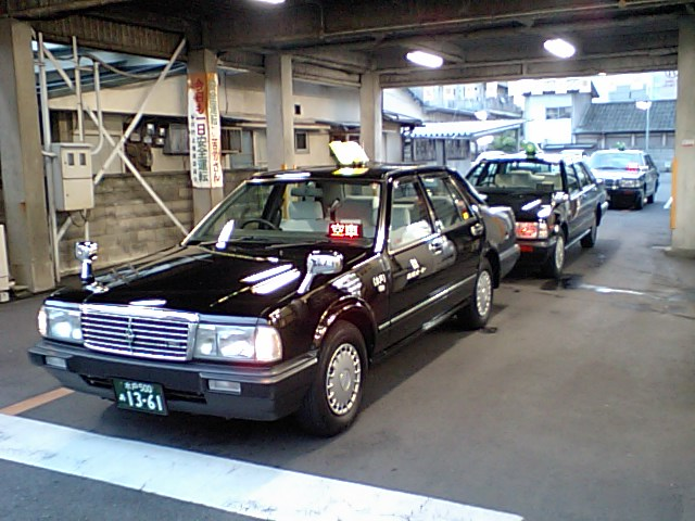 茨城オートタクシー